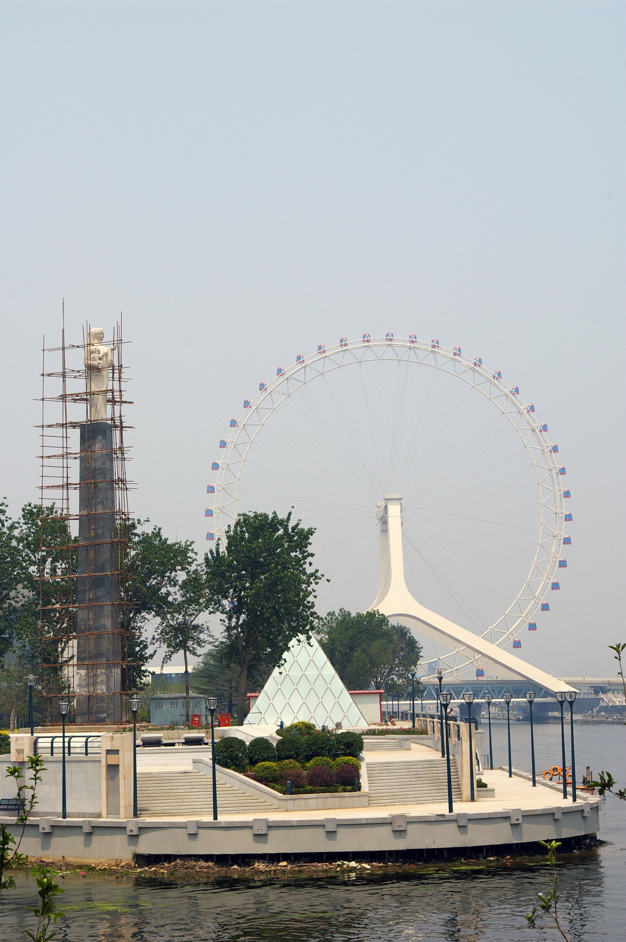 Tianjin haihe